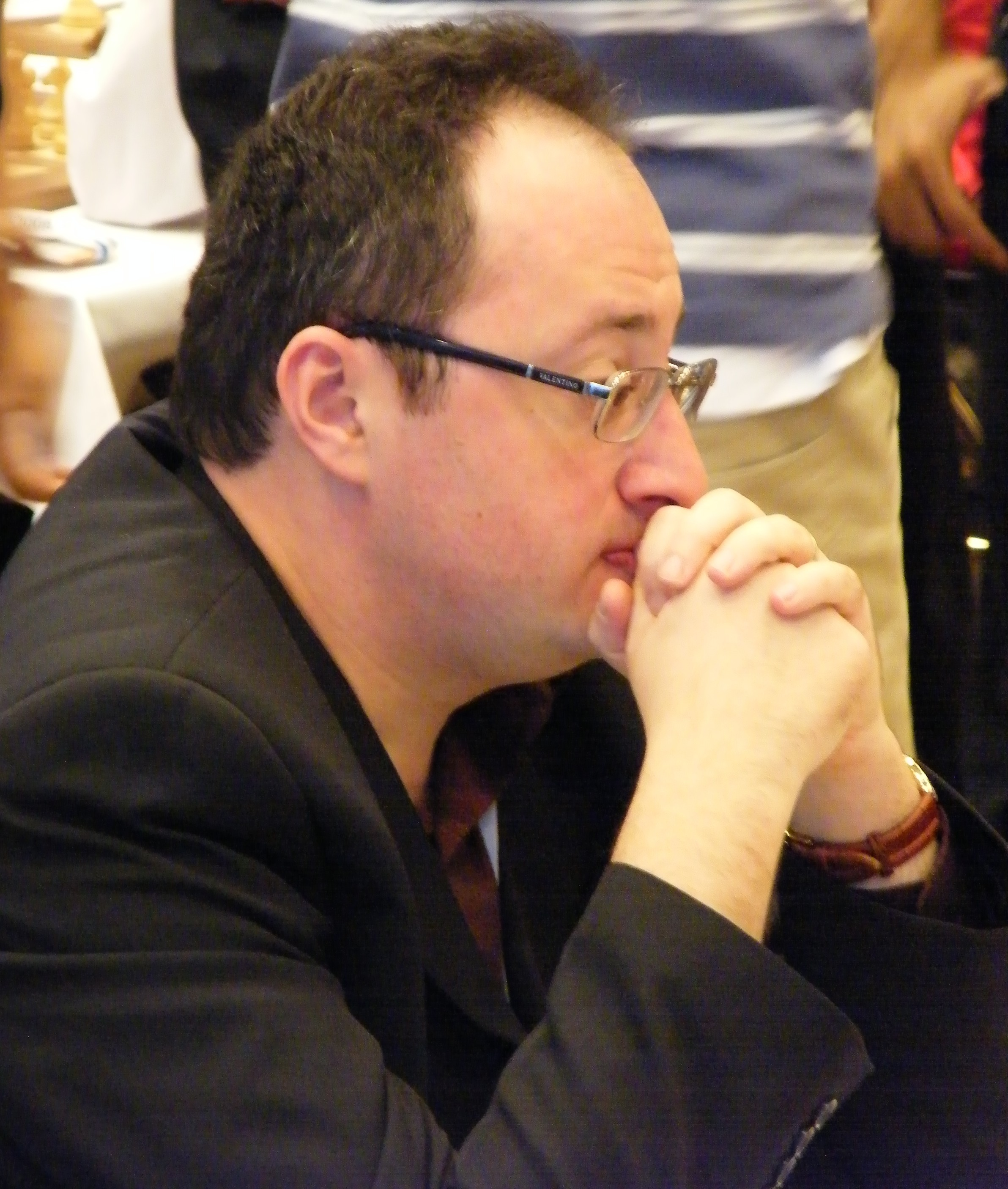 Boris Gelfand bei der 38. Schacholympiade in Dresden 2008